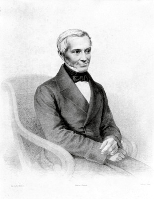 Porträt des Mediziners Karl Heinrich Gotthilf von Köstlin